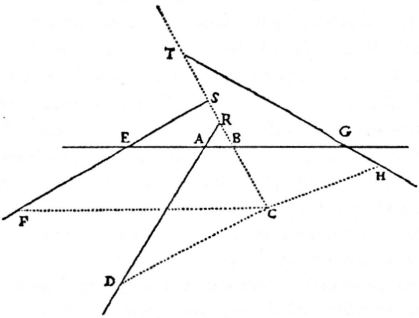 Problema de Pappos a la Geometria de Descartes